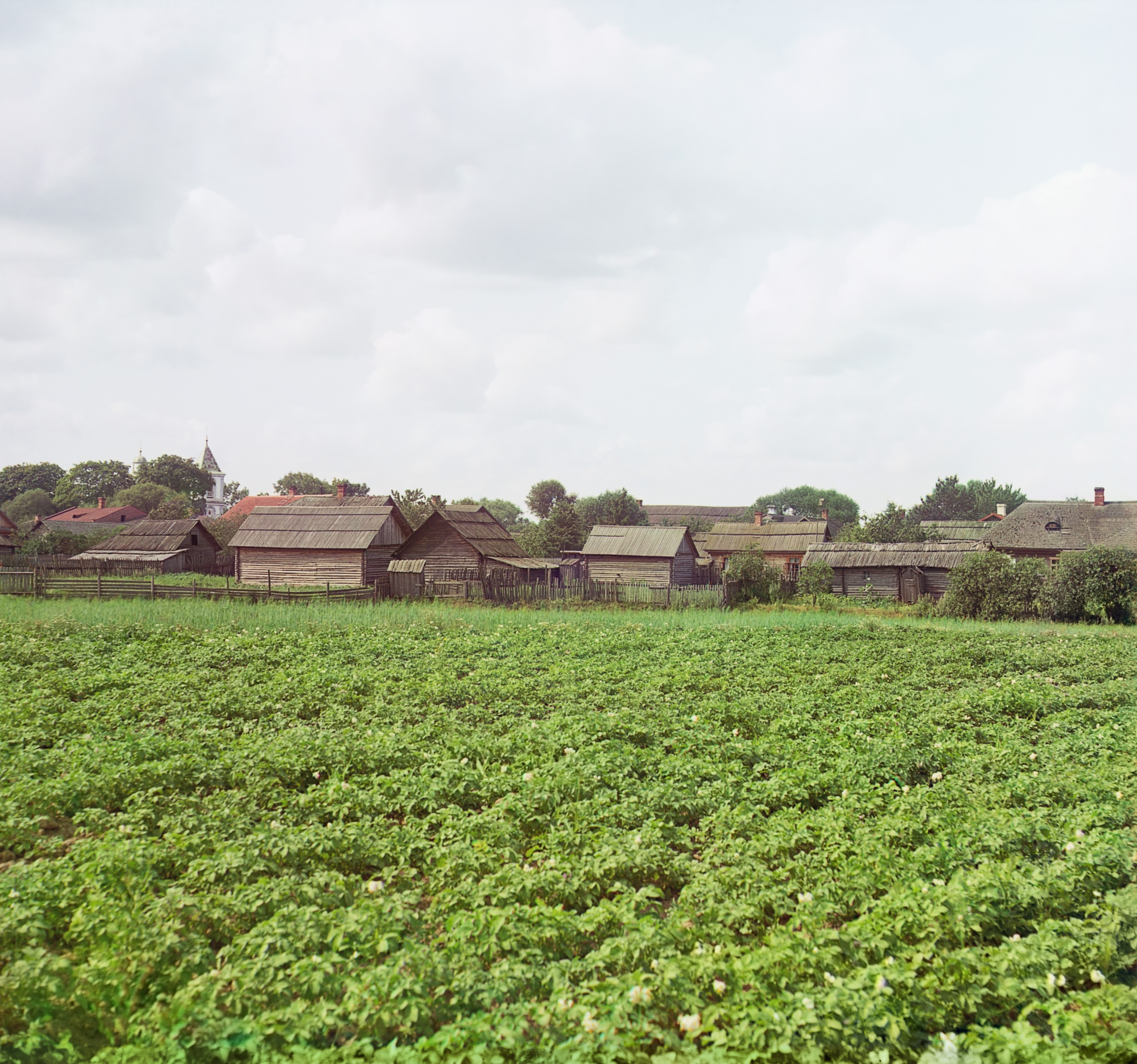 Беларуская (тарашкевіца): Дрыса (Drysa). Панарама места